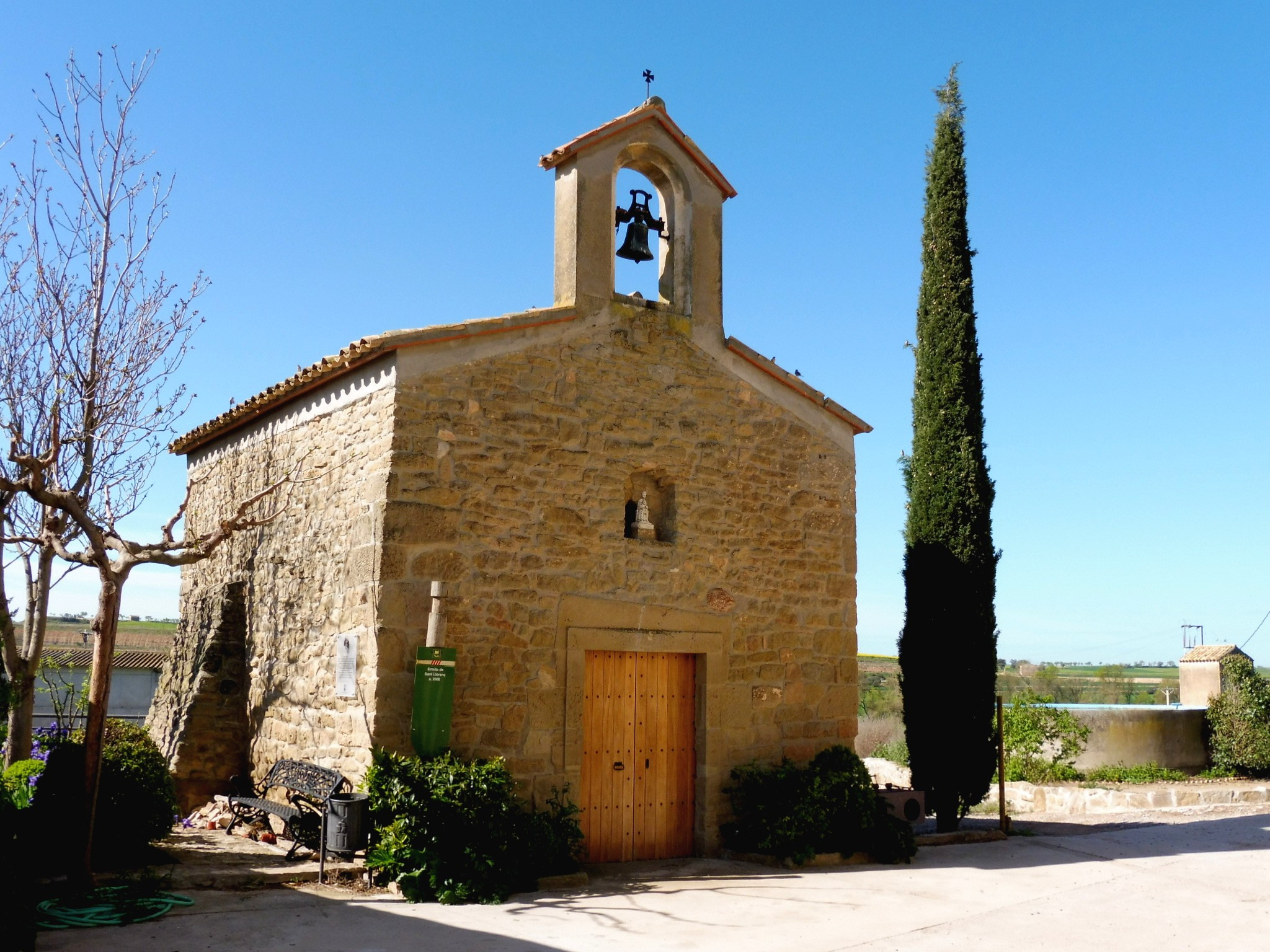 Capella de Sant Llorenç de Ratera (els Plans de Sió)